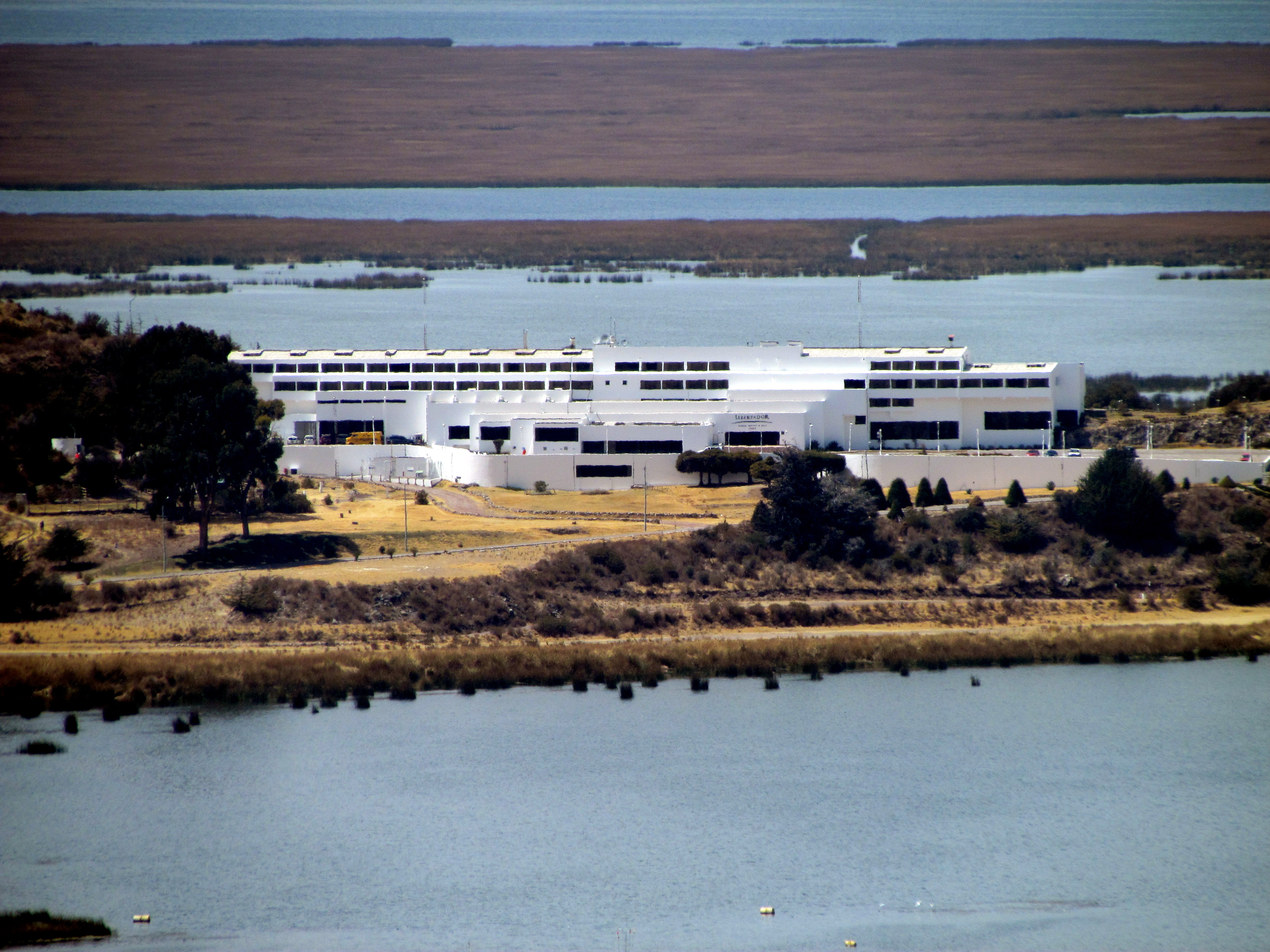 095 Hotel Puno Peru 3366